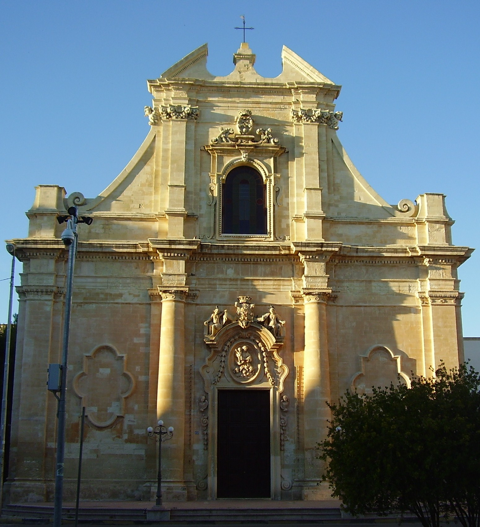 Chiesa di Santa Maria della Grazia Galatina, Lecce